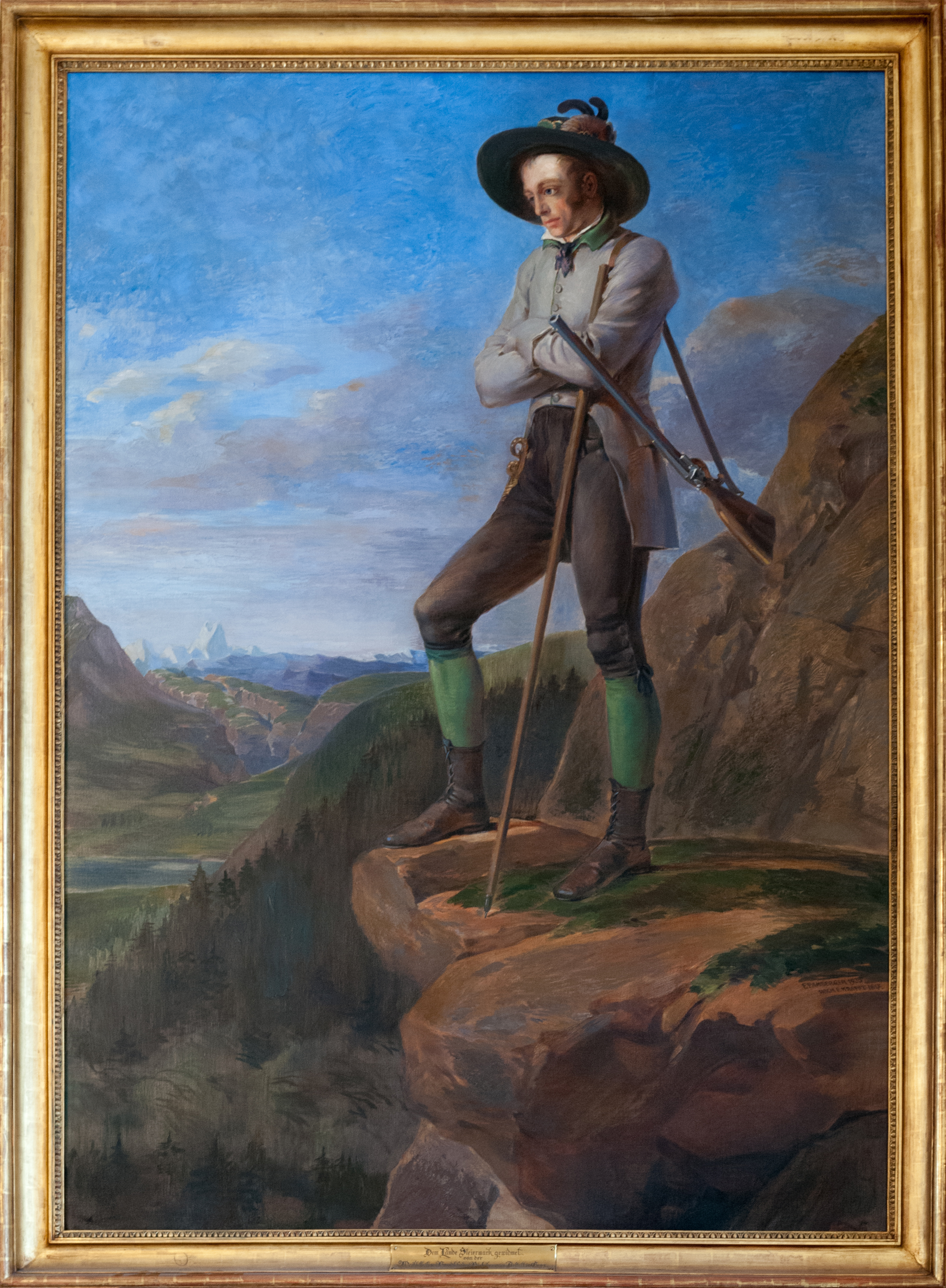 Gemälde von Erzherzog Johann auf dem Hochschwab (bezeichnet: F. Pamberger 1935 nach Peter Krafft 1817).